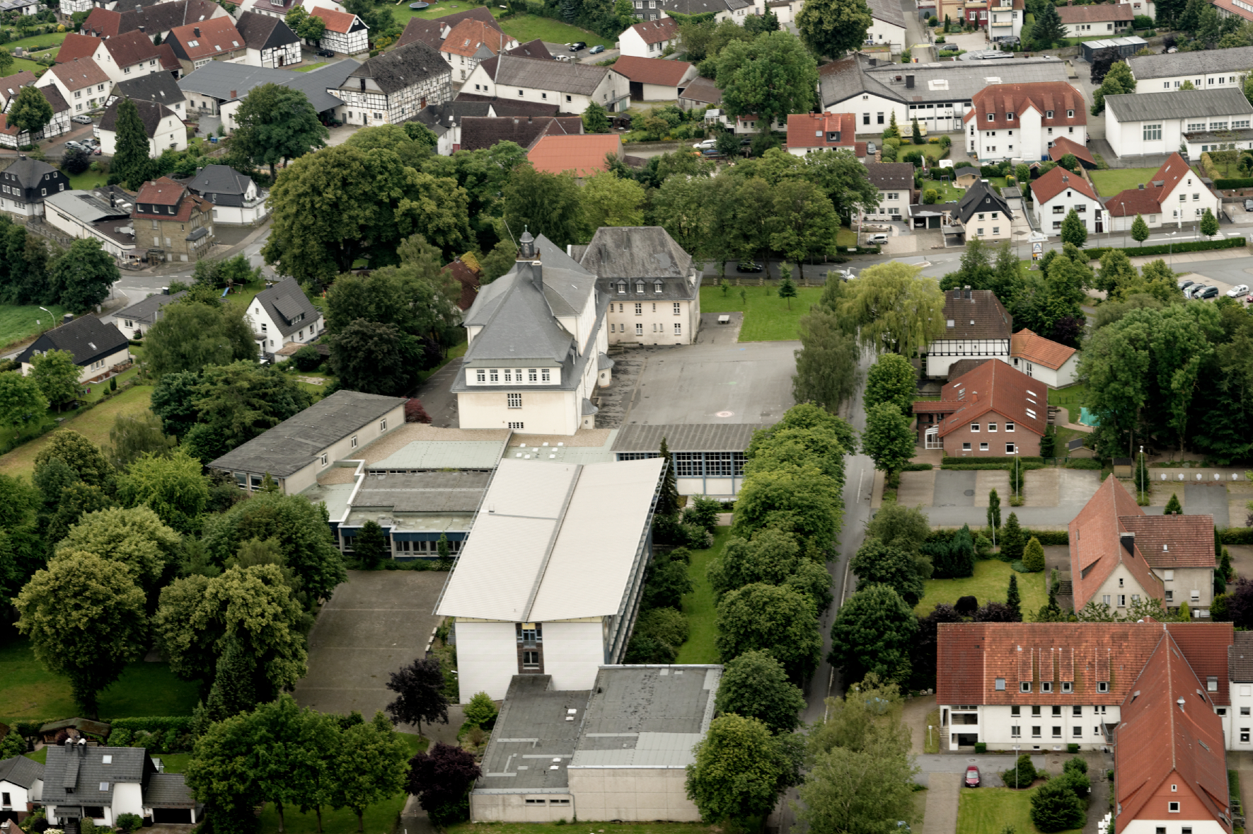 Fotoflug Sauerland Nord. Friedrich-Spee-Gymnasium Rüthen The making of this document was supported by the Community-Budget of Wikimedia Germany.